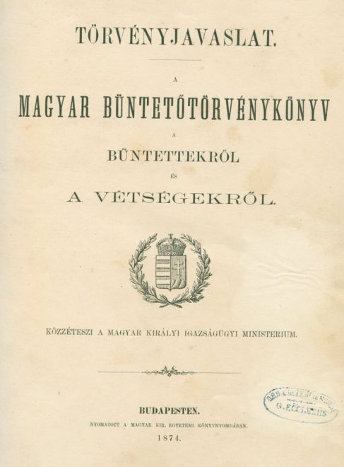 Csemegi-kódex Az első modern magyar büntető törvénykönyv az 1878. évi V. törvénycikk e művön alapult. A szakirodalom a kodifikátora, Csemegi Károly után Csemegi-kódexnek nevezi. A kódex a börtönügy szabályozását is tartalmazta, oly módon, hogy a büntetési rendszerről szóló fejezetébe vette fel a szabadságvesztés büntetésre és annak végrehajtására vonatkozó legfontosabb rendelkezéseket.